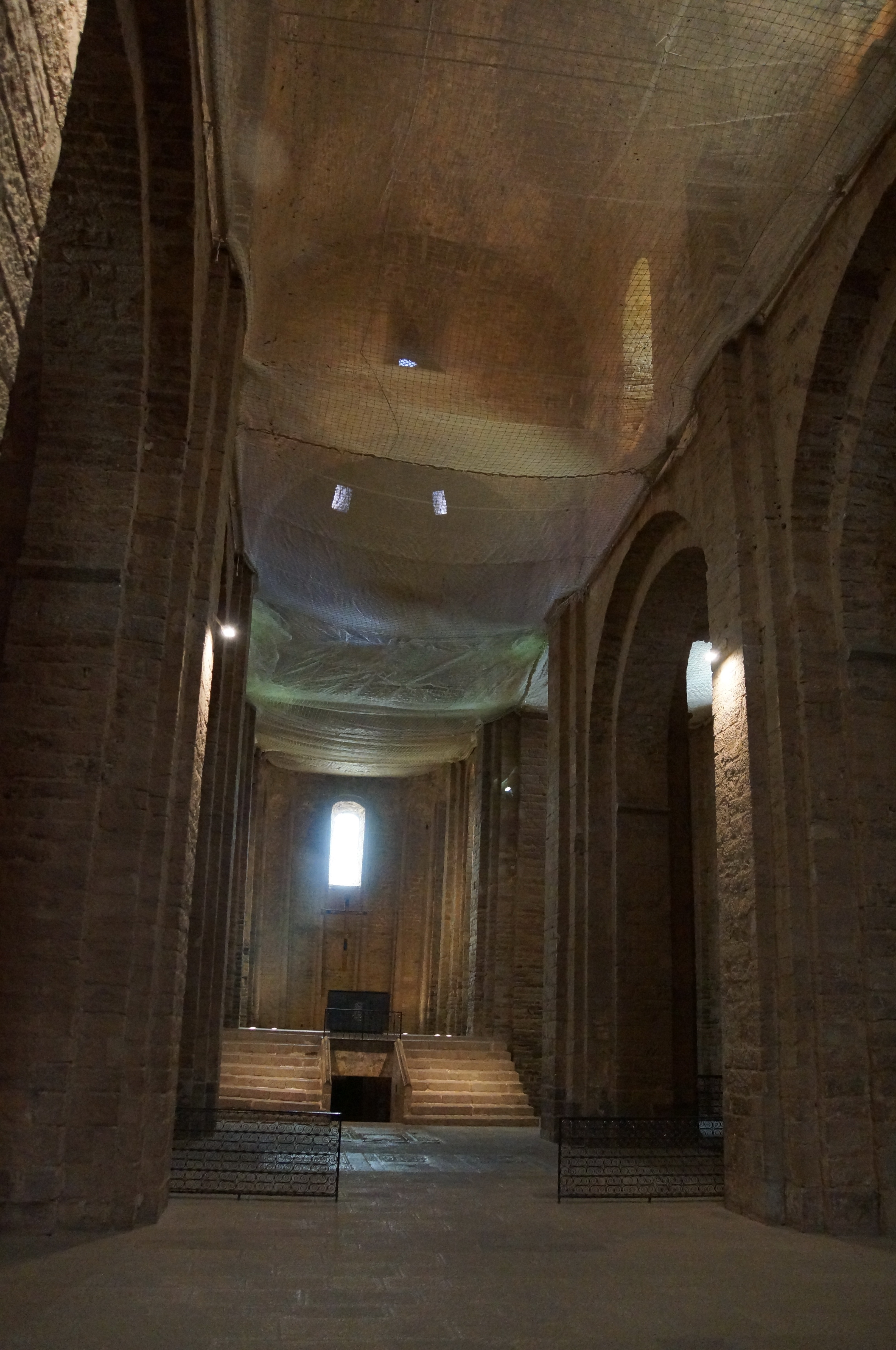 Canònica de Sant Vicenç de Cardona